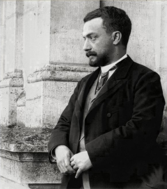 Portrait de Salomon Reinach au musée.